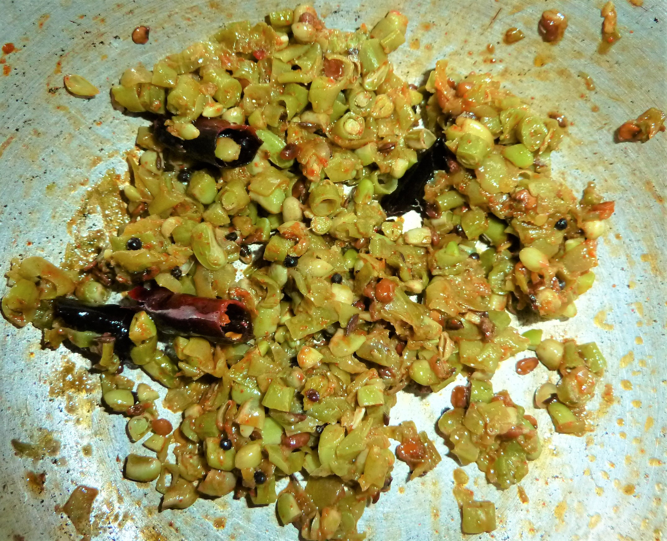 బర్బాటీ పోపు కూర